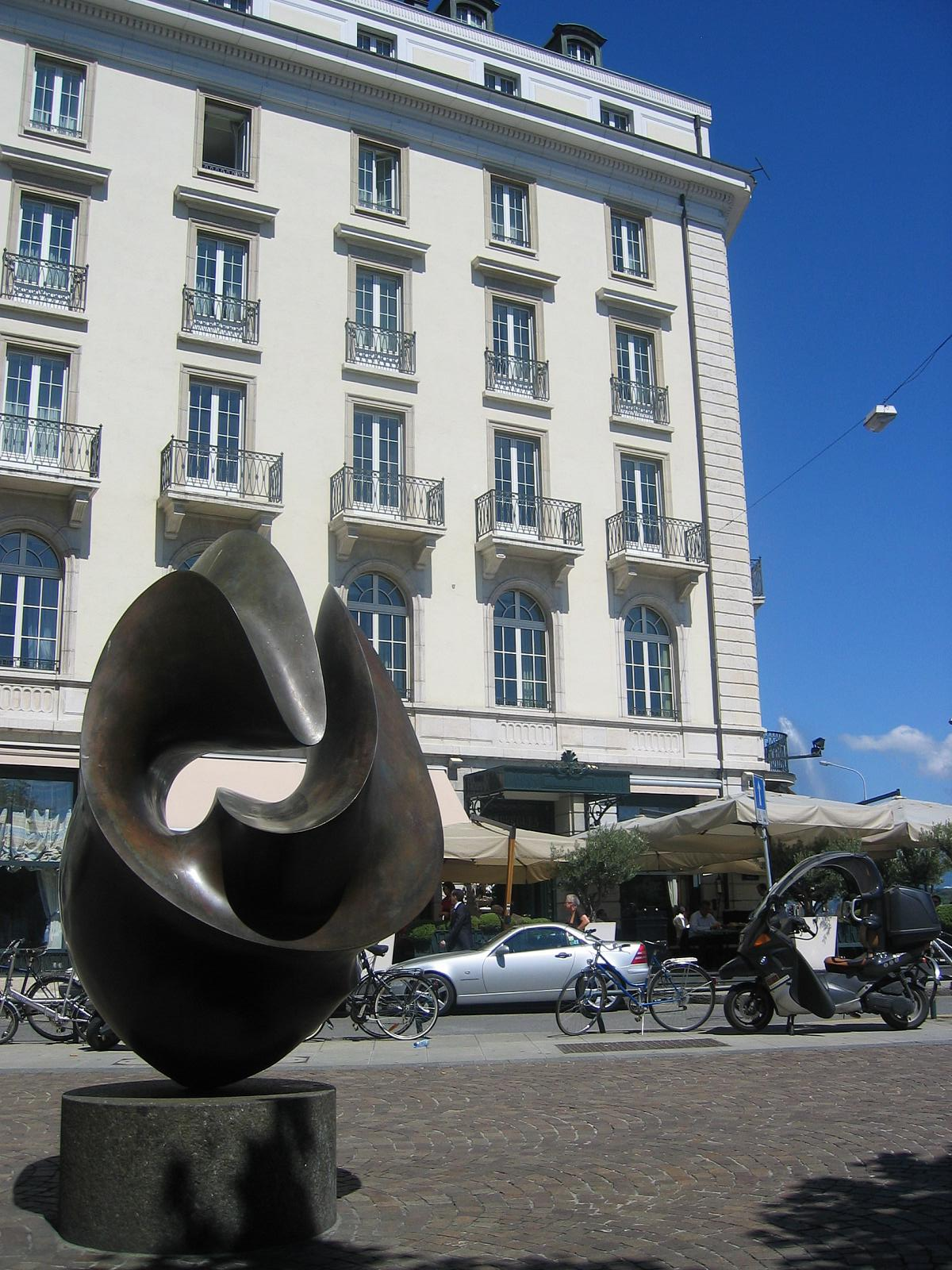 Hôtel des Bergues à Genève